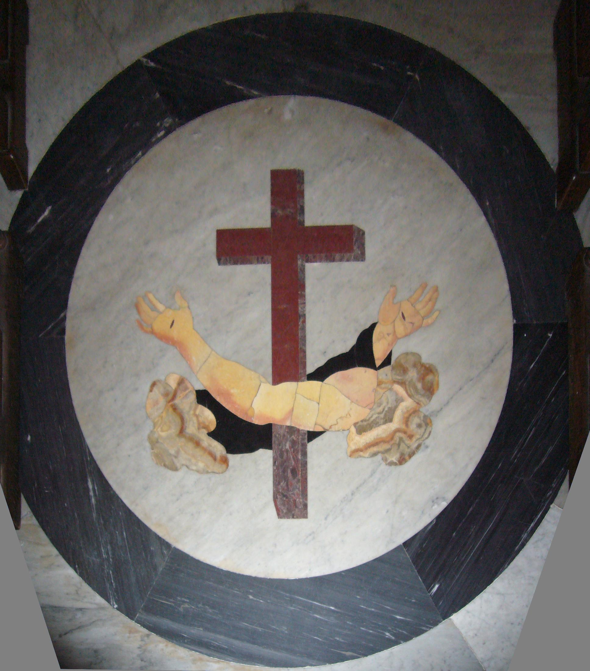 Roma, santa Dorotea: emblema francescano nella chiesa